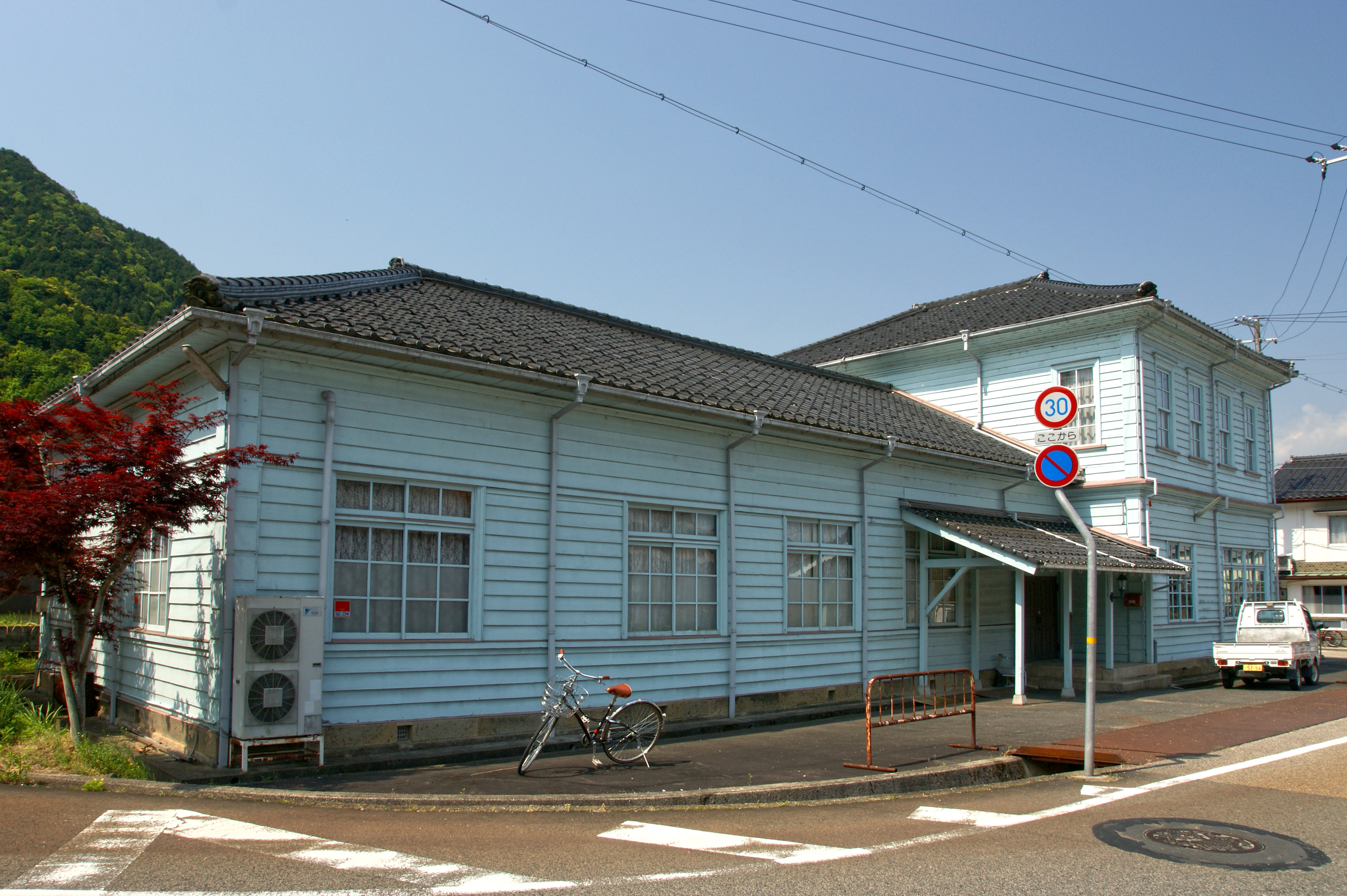 Meiji-Kan in Toyooka, Hyogo prefecture, Japan